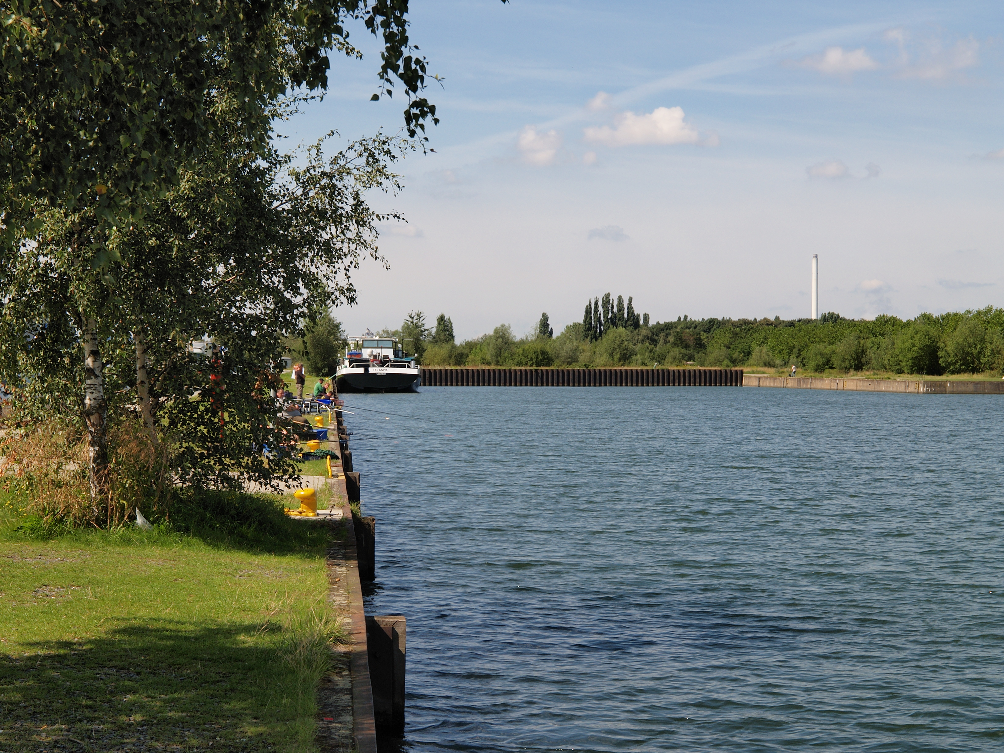 Hafenbecken und Kaimauer (links) des Hafens Friedrich der Große am Rhein-Herne-Kanal in Herne